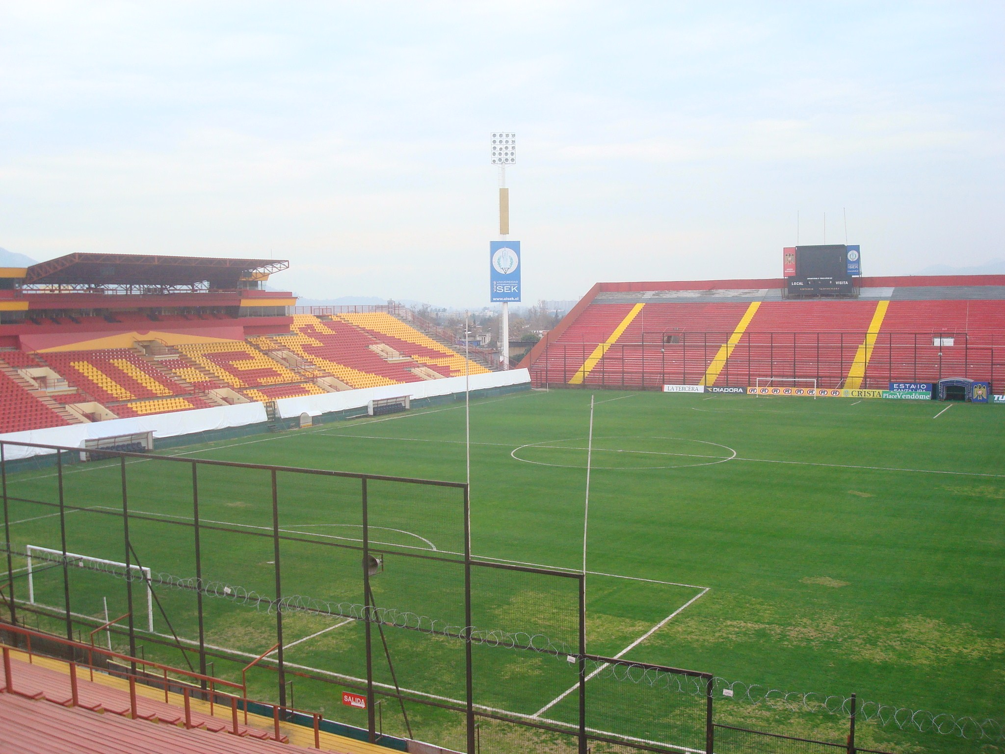 Estadio Santa Laura, Independencia, Santiago de Chile